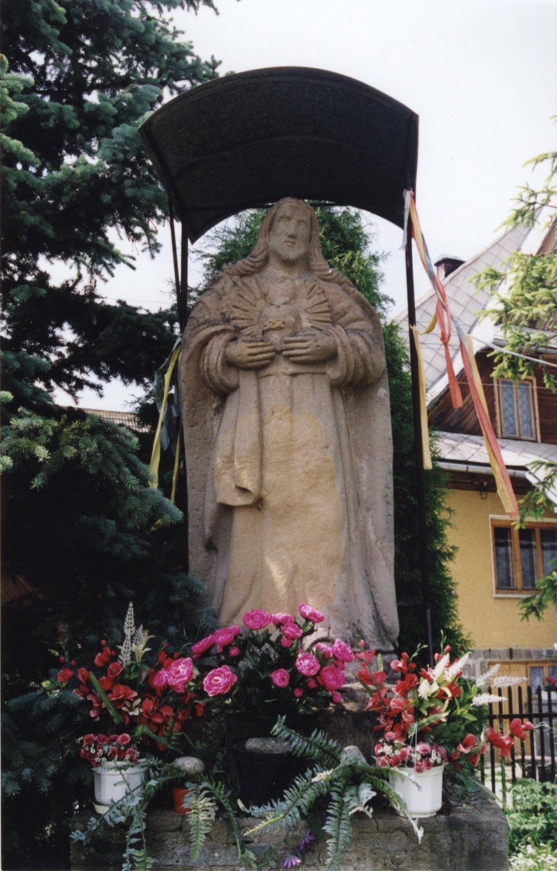 Rzeźba Serca Jezusowego w Hodówce autorstwa Piotra Kułacha